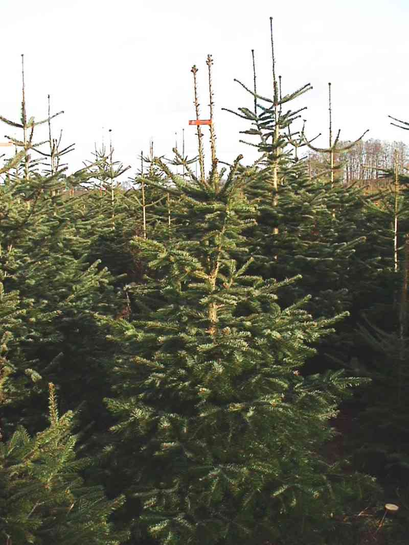 Nordmanntannen (Abies nordmanniana) in Weihnachtsbaumkultur